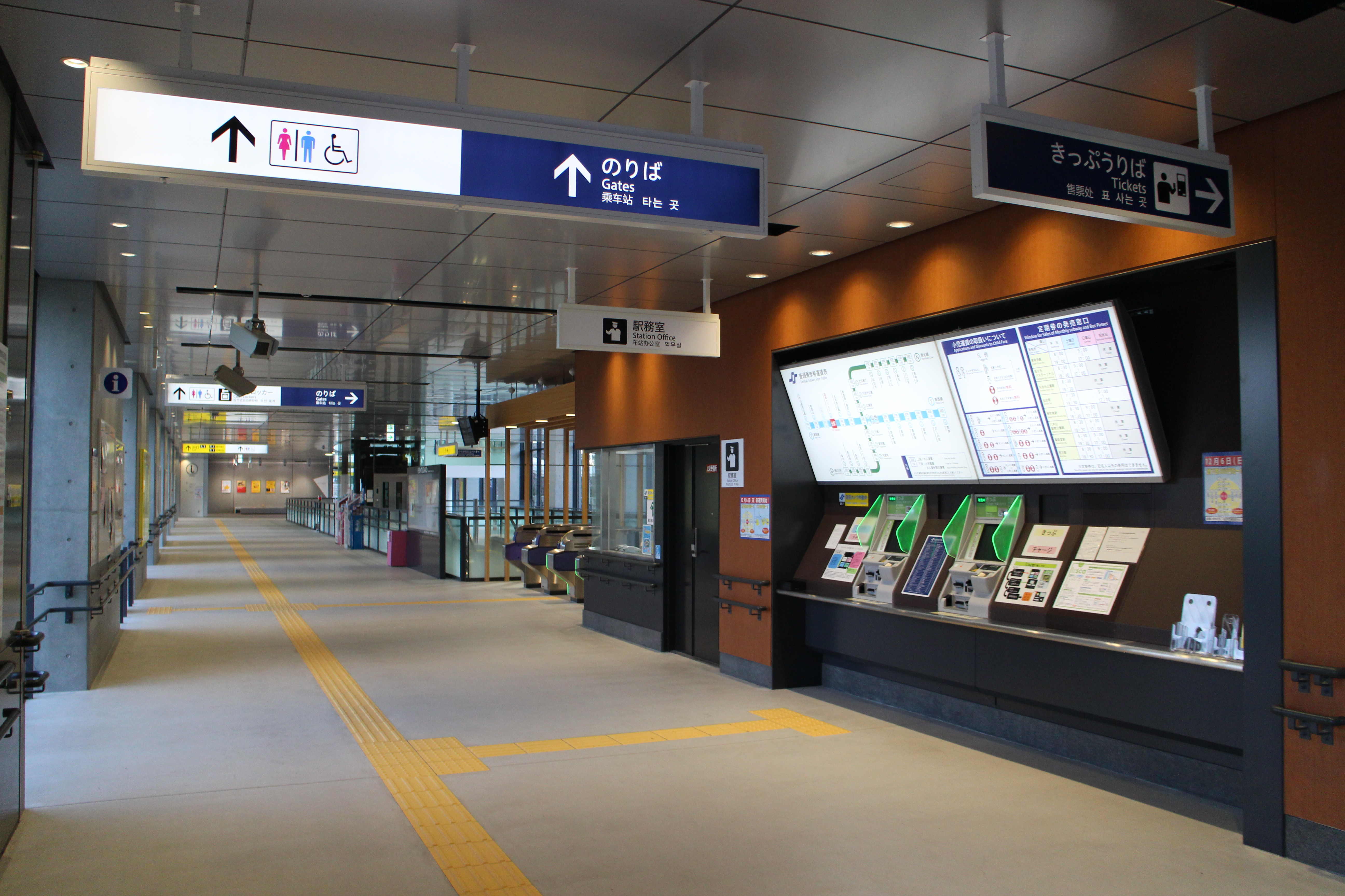 国際センター駅切符売り場・改札